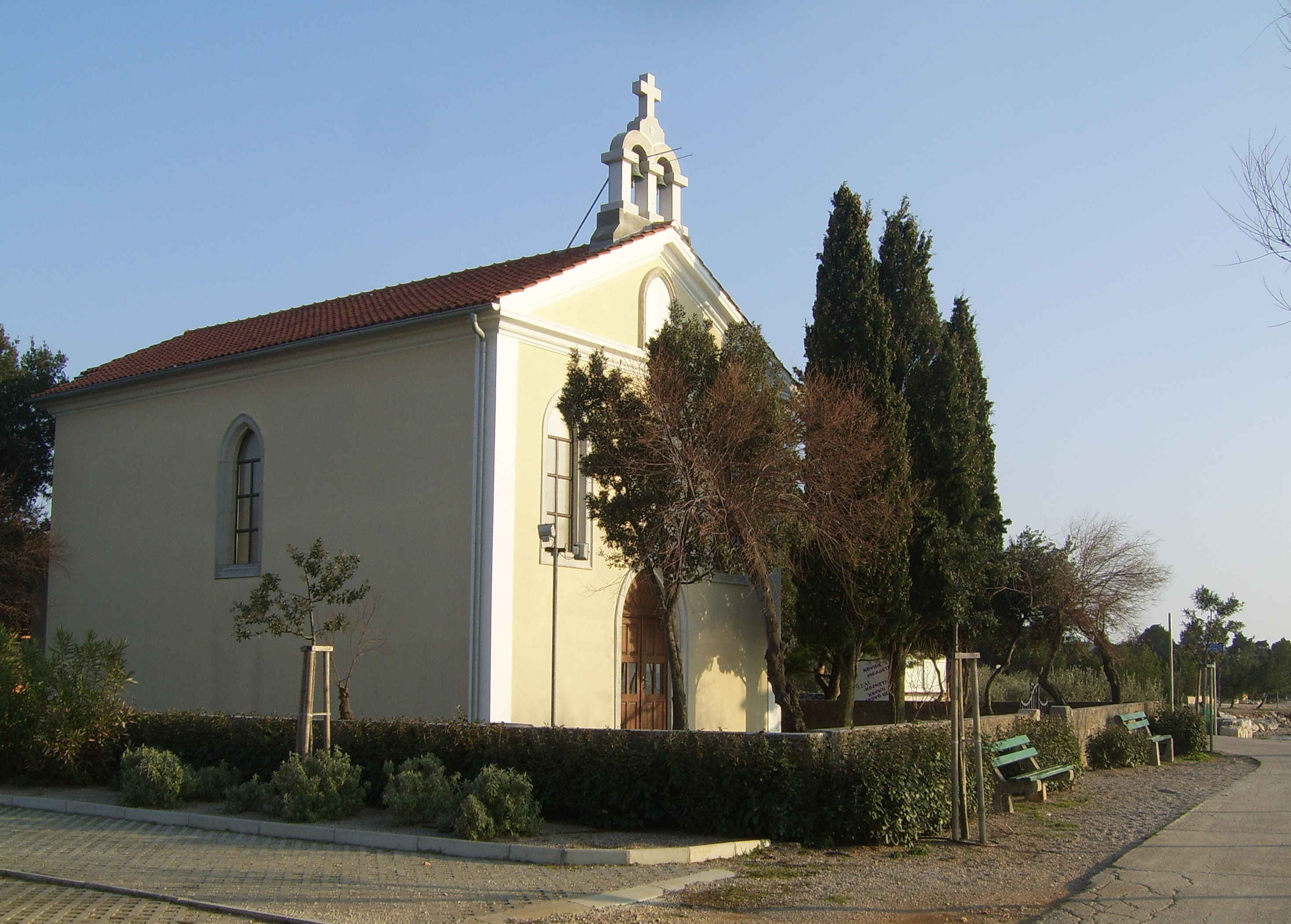 Crikvica svetog Mikule (Nikole) na Buki u Puntu